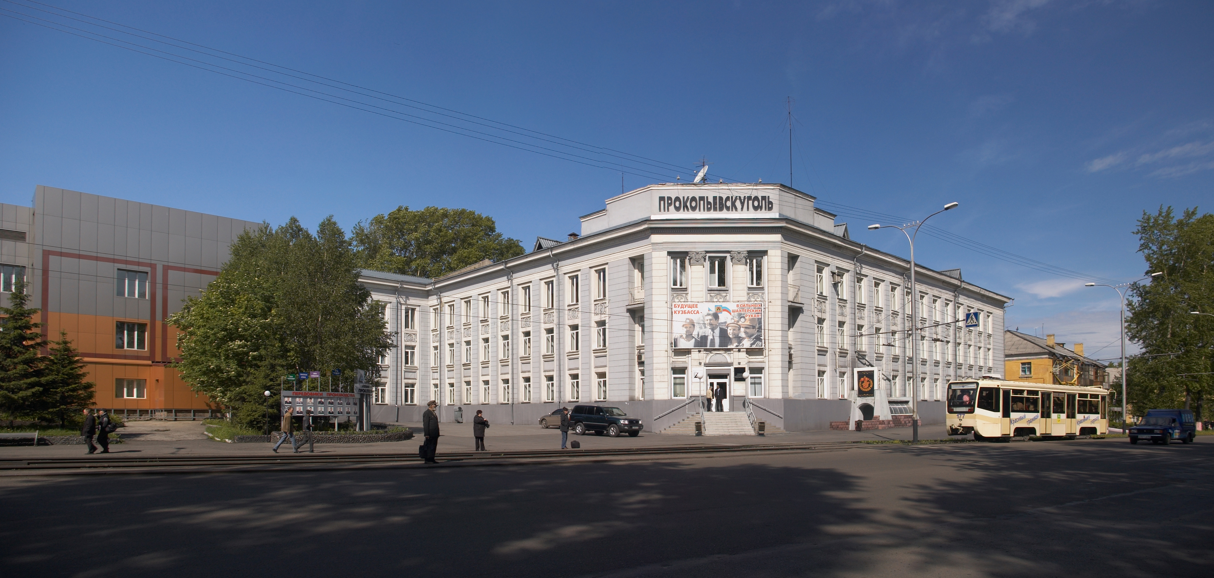 Здание УК «Прокопьевскуголь», 26 мая 2007 г., панорама из 2-х кадров